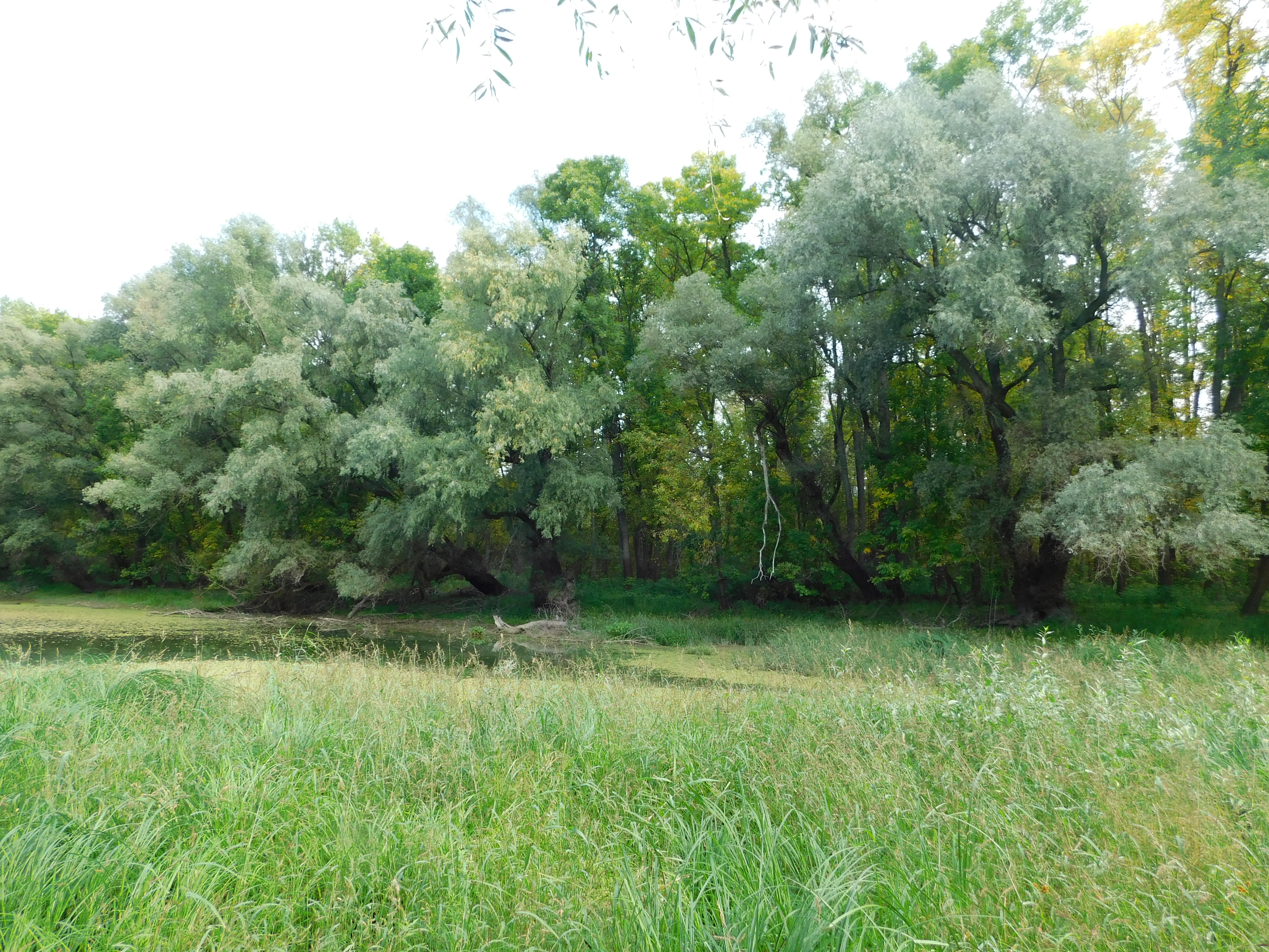 Srpski (latinica): Plavne šume i priobalna područja duž reka, pored toga što su izuzetno značajna za mnoge vrste organizama, one predstavljaju i tampon-zonu u kojoj se zagađena voda iz reka samoprečišćava. Takođe su vrlo značajne u periodu sezonskih kiša jer upijaju višak vode i samim tim smanjuju snagu matice i sprečavaju poplave. Na slici se nalazi plavna šuma vrbe (Salix sp.) i poljskog jasena (Fraxinus angustifolia) na levoj obali Karlovačkog dunavca.